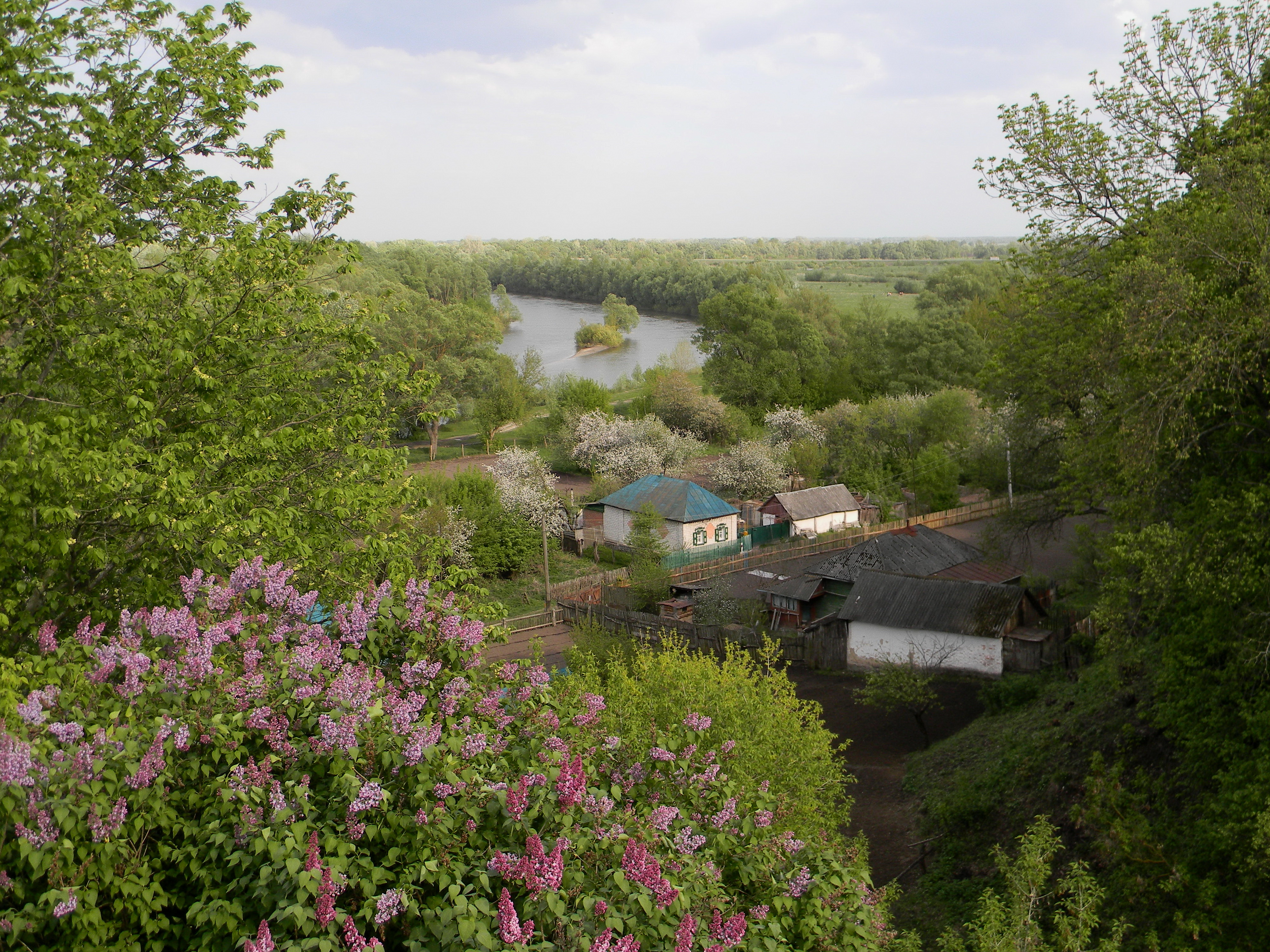 Кочубеївський, Бахмацький район, смт. Батурин